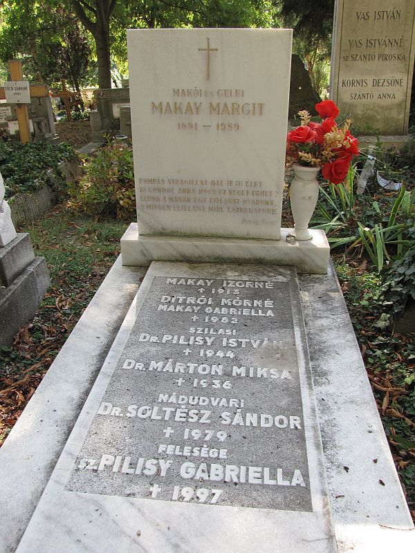 Makay Margit (Miskolc, 1891. augusztus 4. – Budapest, 1989. november 6.) magyar színésznő sírja Budapesten. Farkasréti temető: 31-2080.